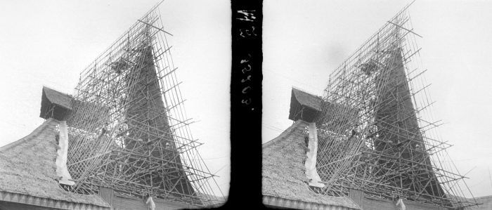 Negatief. Bamboe als bouwmateriaal; hier gebruikt voor het maken van een dakconstructie